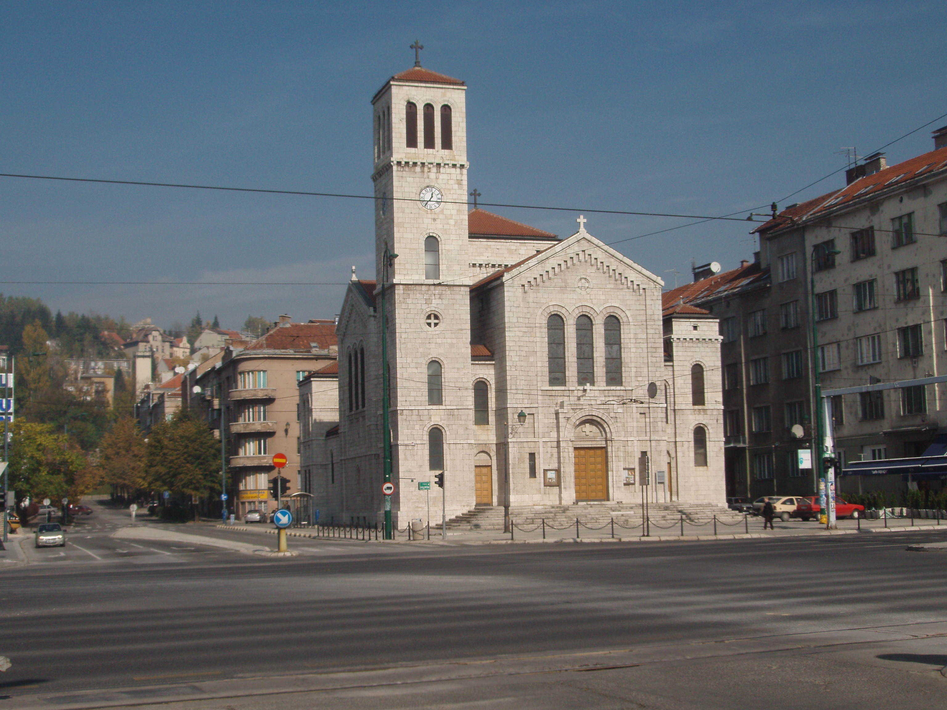 Crkva Sv. Josipa